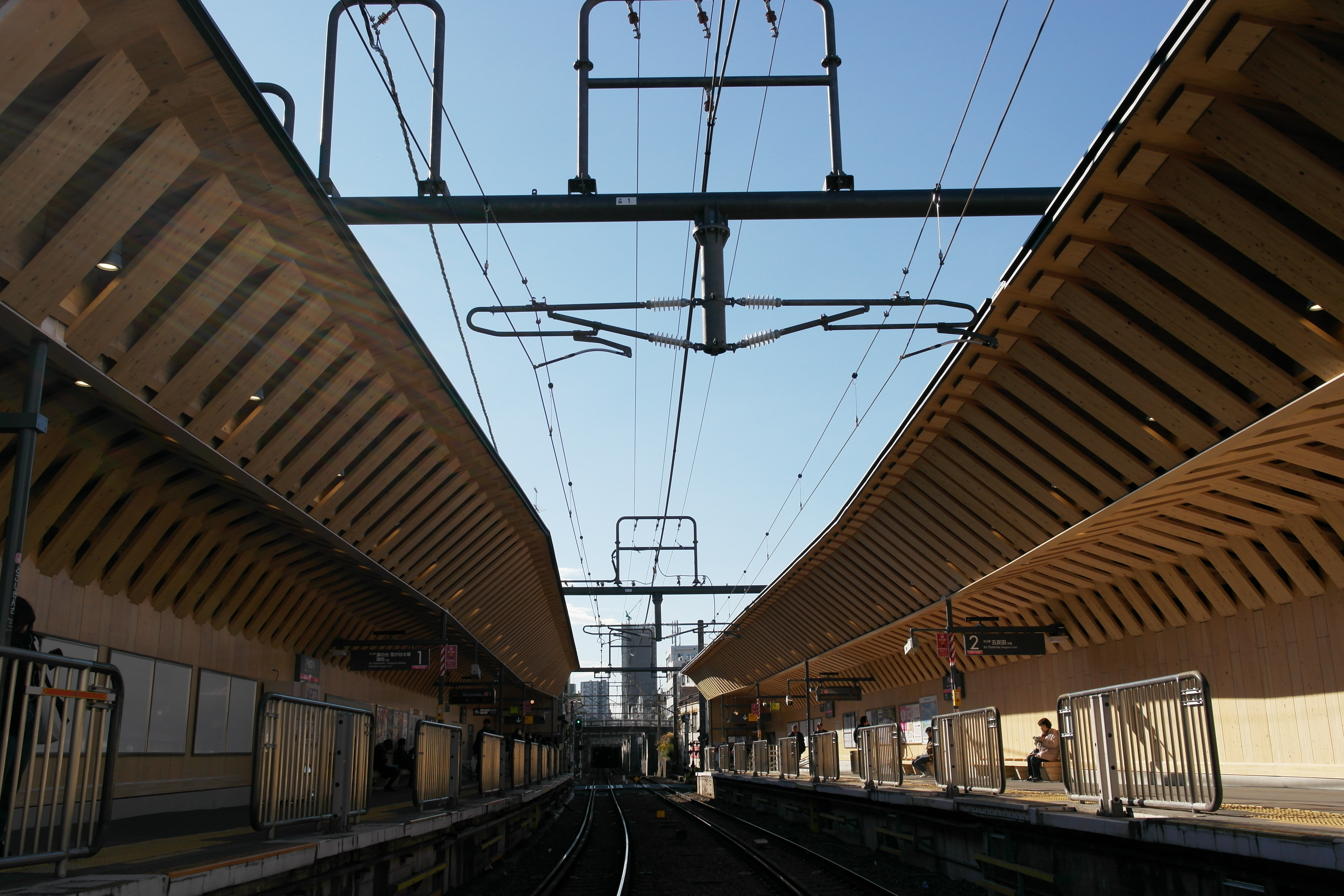 2016年（平成28年）12月にリニューアルされた東急池上線戸越銀座駅